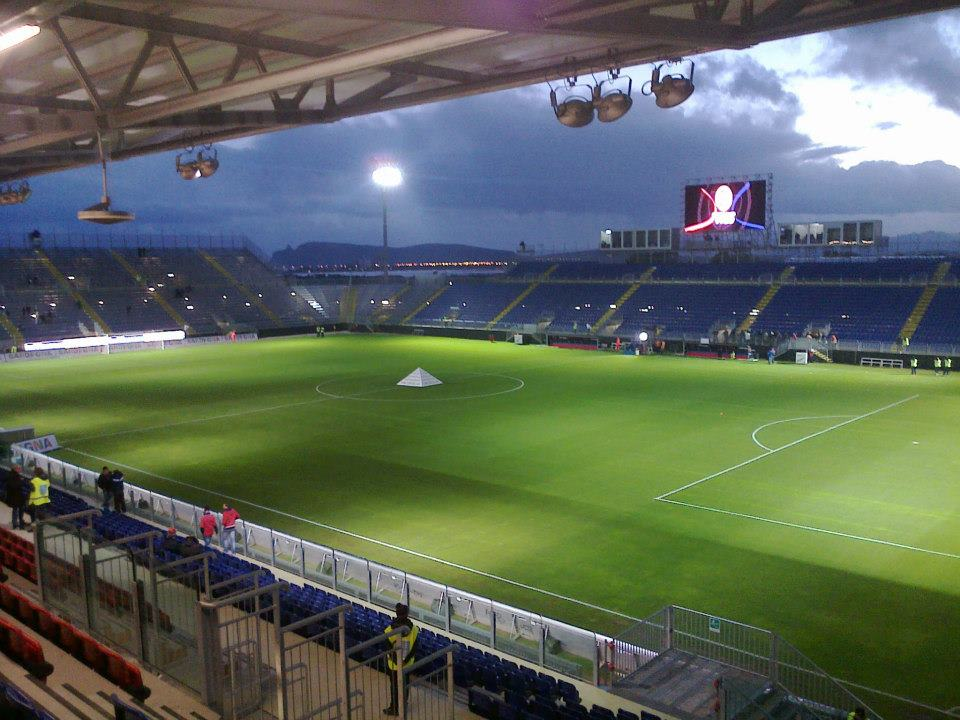 Stadio Is Arenas